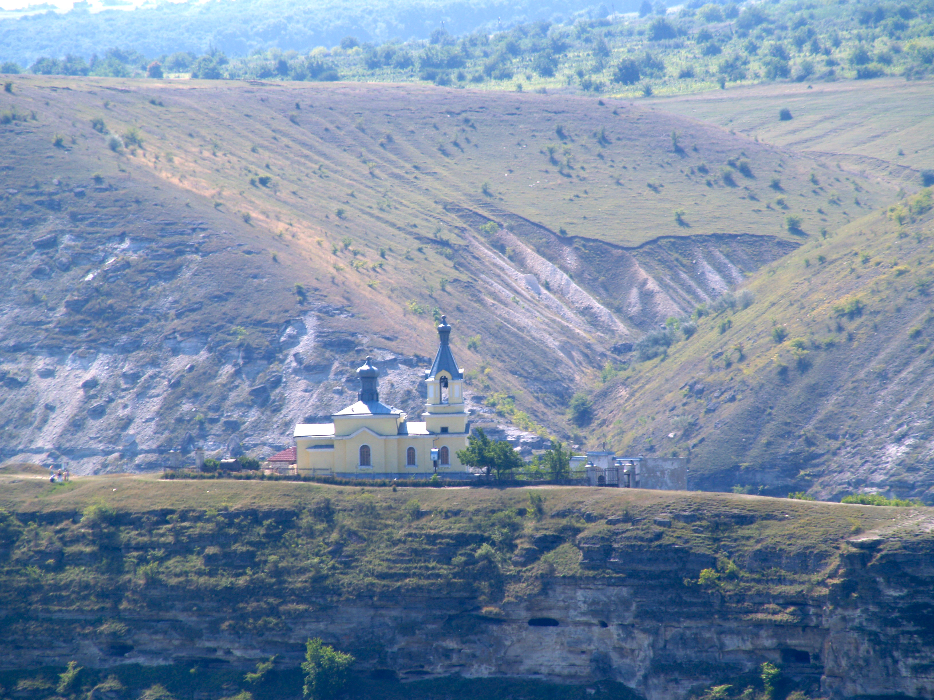 Orhei Vechi, Moldova